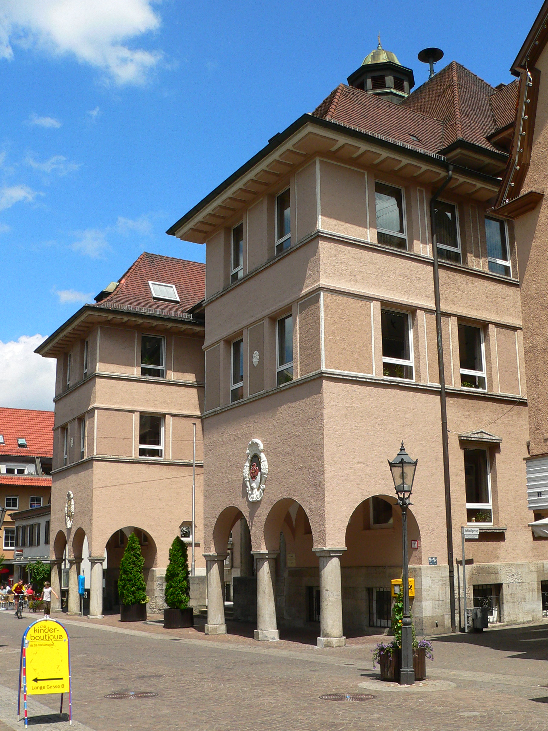 Rathaus, Geislingen an der Steige, Deutschland